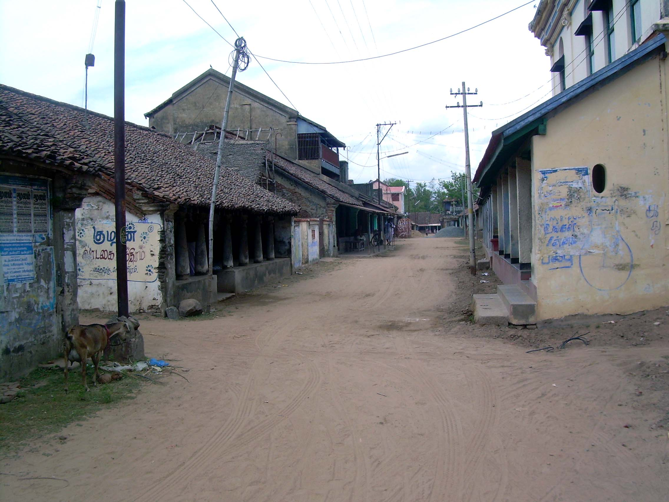 The famous agraharam of Sengalipuram near Kumbakonam